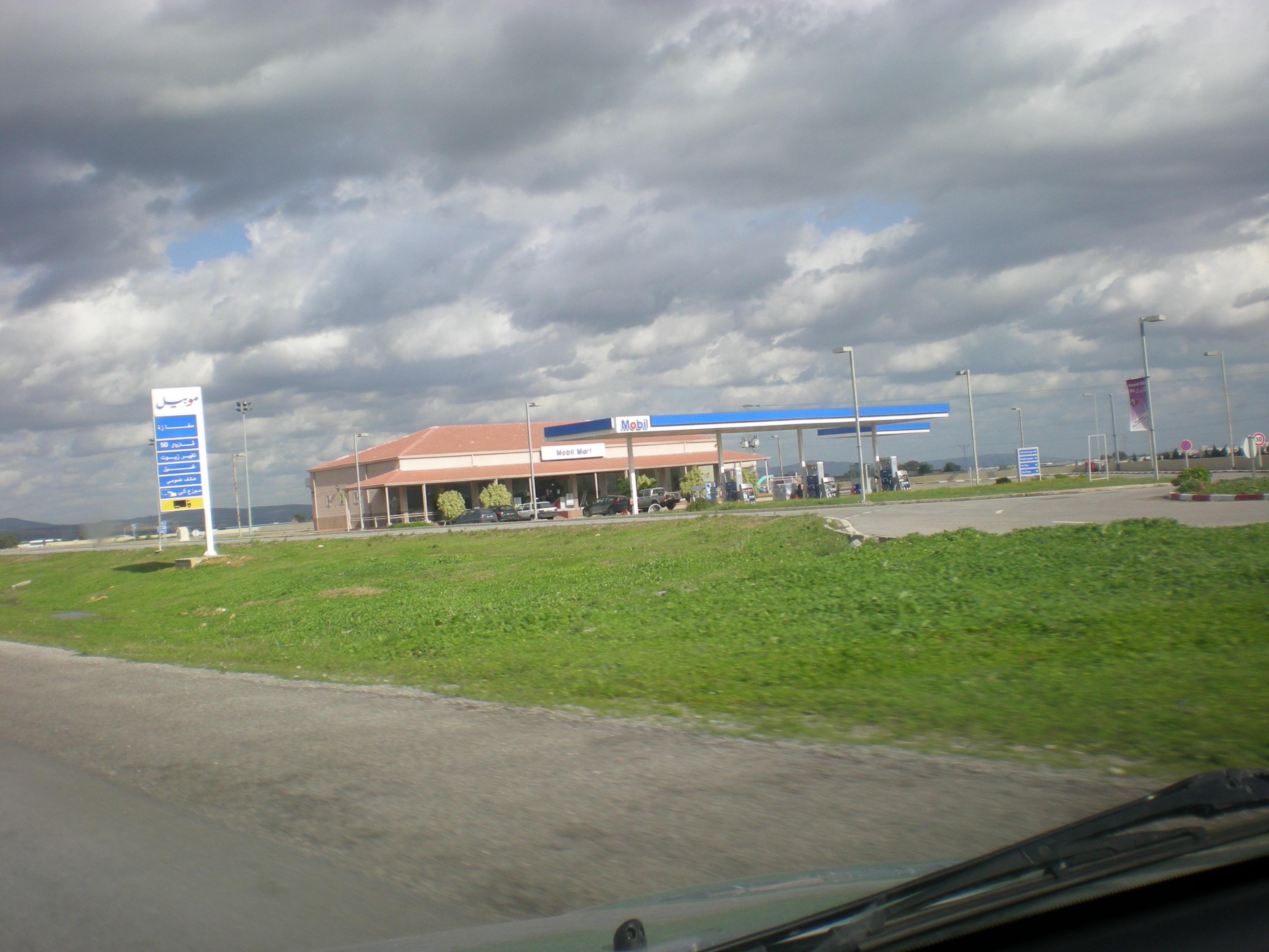 Air de service et de restauration d'Utique sur l'A4, Tunisie